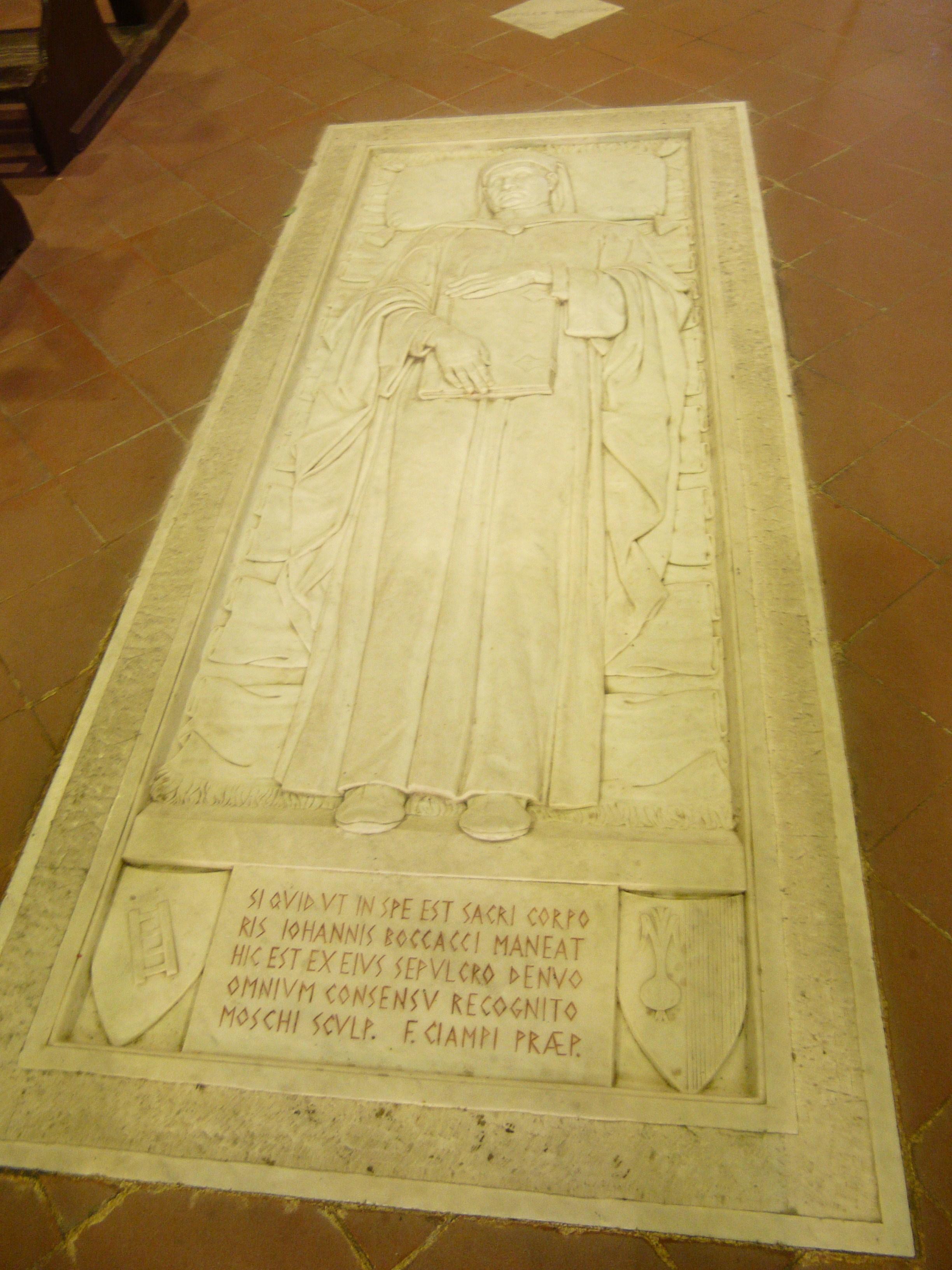 Lastra tombale in onore di Giovanni Boccaccio, al centro della navata della chiesa dei Santi Jacopo e Filippo a Certaldo. La lastra fu realizzata tra la fine del XIX e l'inizio del XX secolo, replicando con poche varianti il famoso affresco di Andrea del Castagno facente parte della celeberrima serie di uomini illustri da lui dipinta, oggi agli Uffizi. Attenzione: le spoglie del Boccaccio non sono sotto la lastra, bensì sotto una piccola mattonella bianca nelle immediate vicinanze.